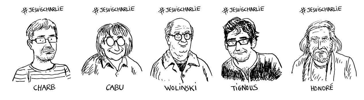 Nous sommes Charlie, par Jazzi - Les étudiants du CESAN rendent hommage